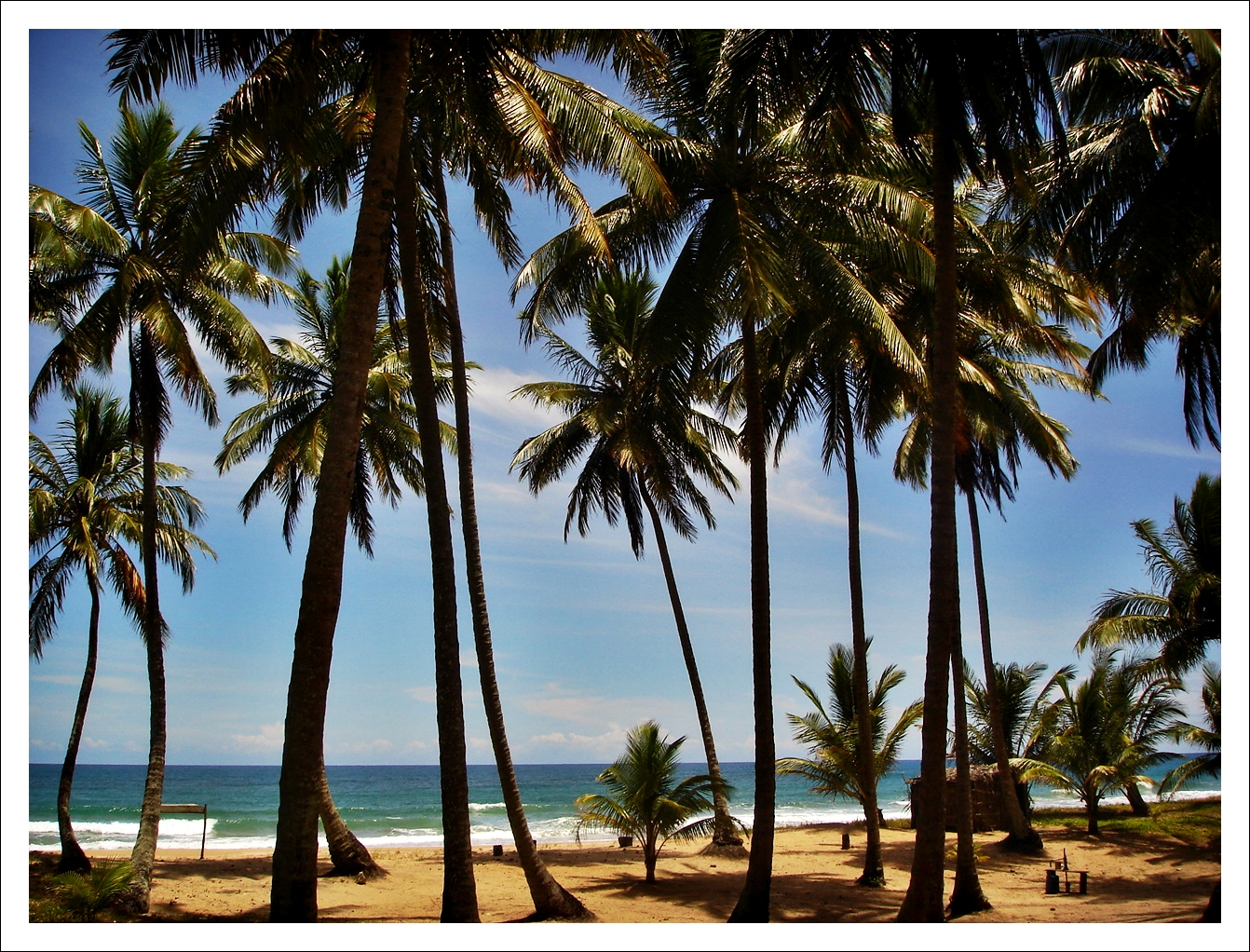 Taipus de Fora, Maraú, Bahia